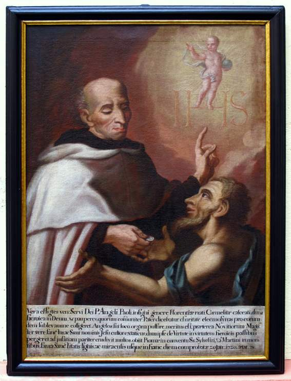 Pater Angelus Paoli O.Carm., Öl auf Leinwand, 18. Jahrhundert, Karmelitenkloster Straubing